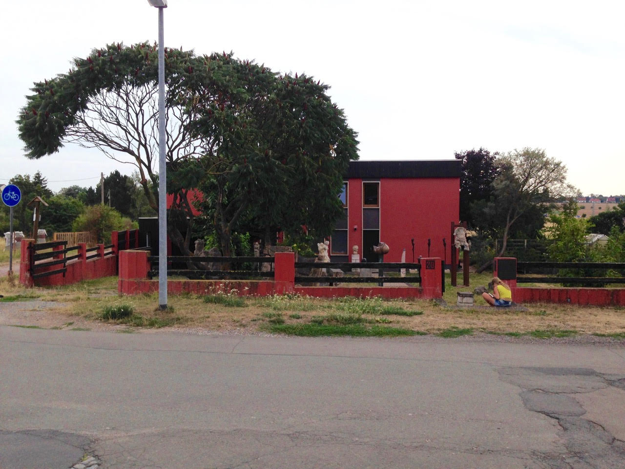 Ansicht Atelierhaus Homburger Weg, Bad Langensalza